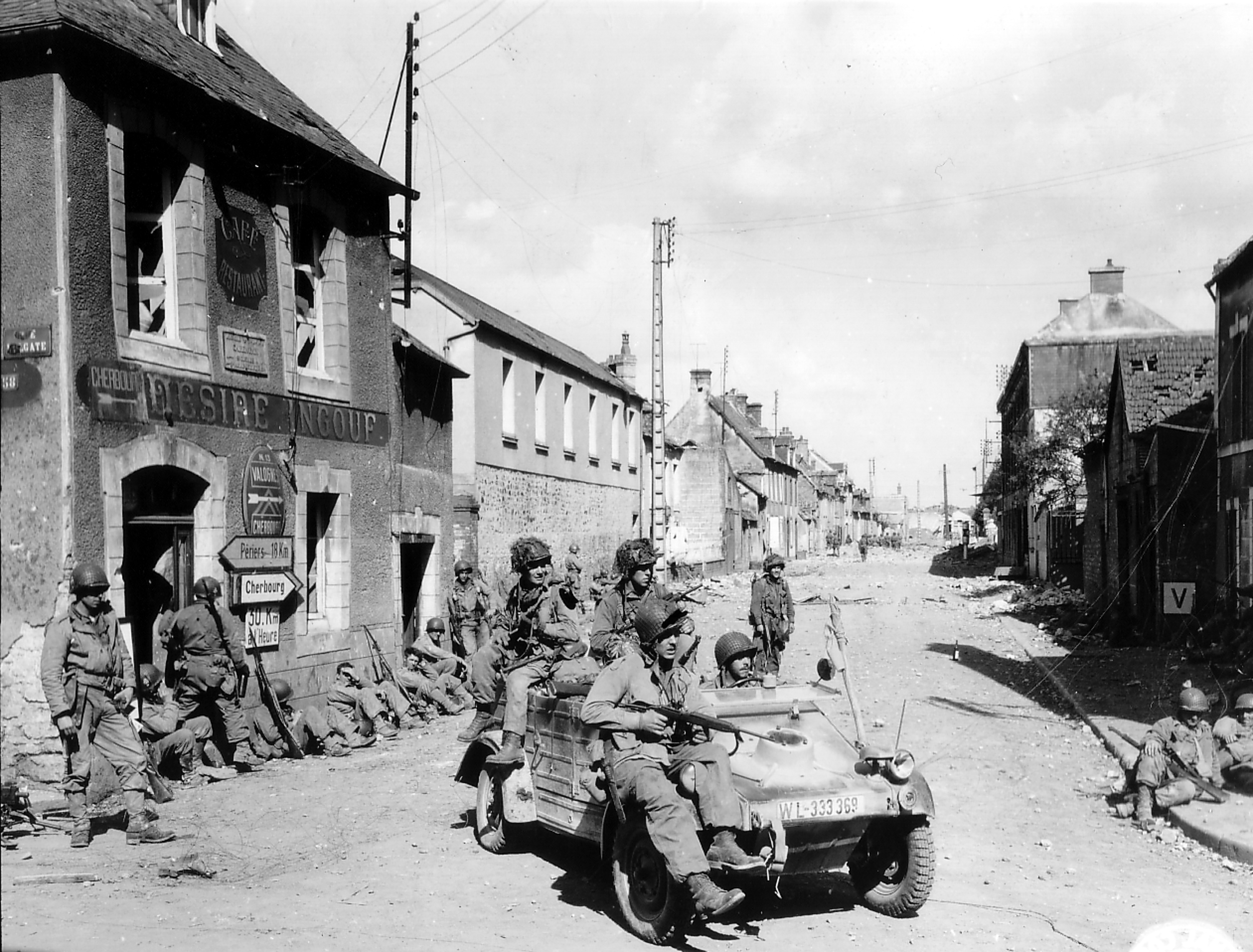 Des parachutistes américains dans une Jeep allemande roulent dans Carentan tandis que d'autres soldats américains se reposent, adossés le long d'une maison.